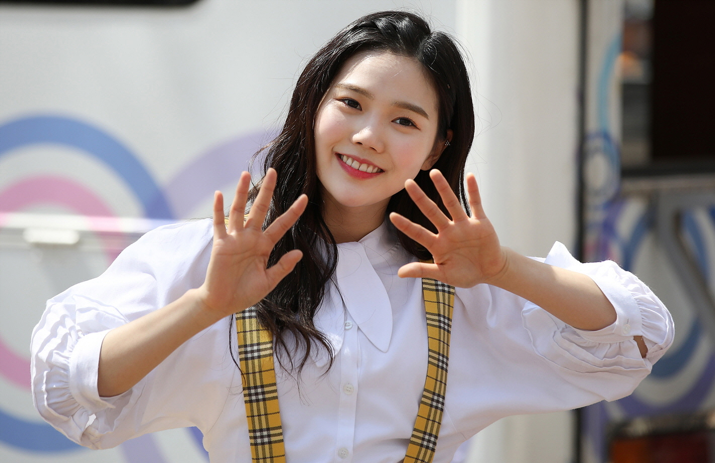 180411 이수지의가요광장 공개방송 오마이걸